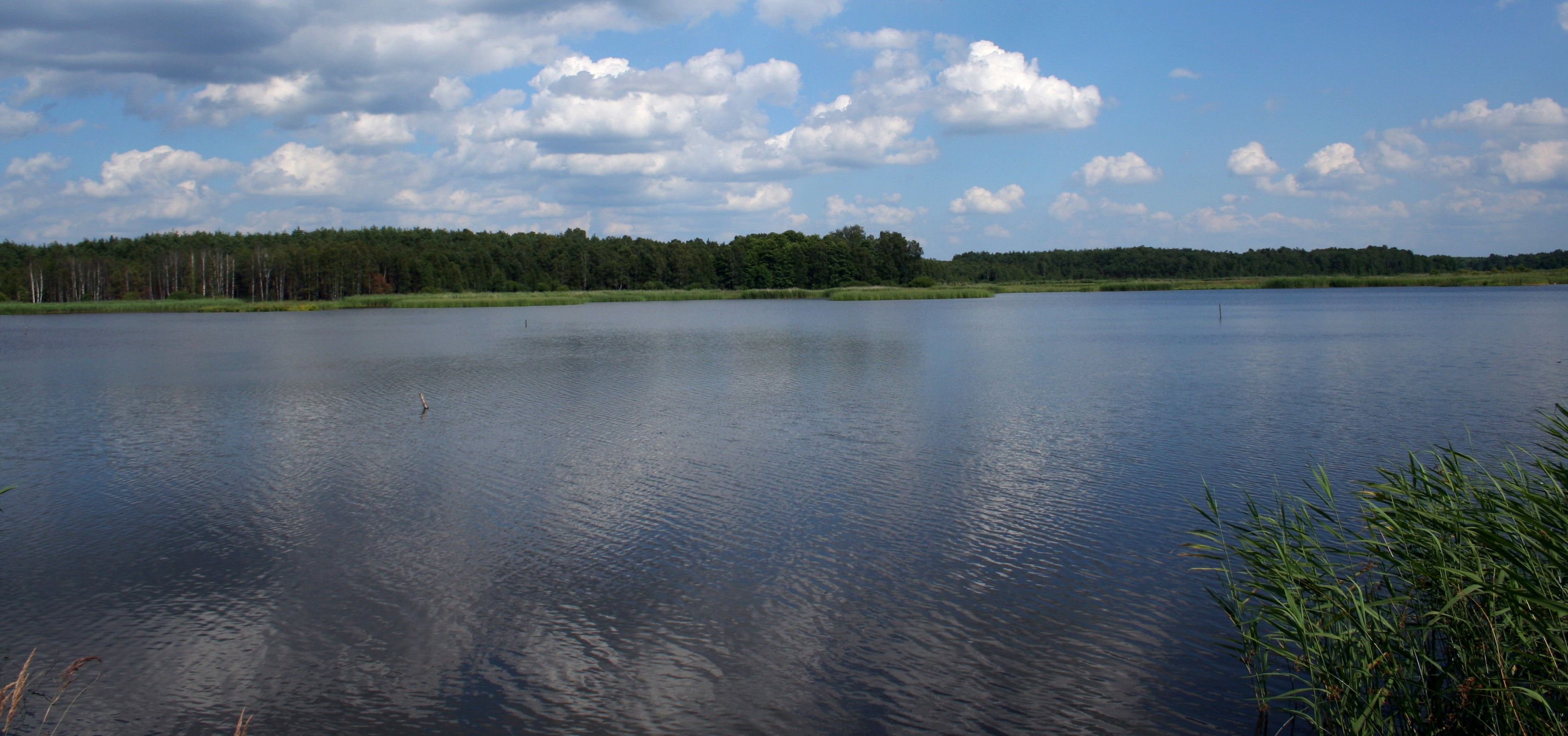 staw w miejscowości Piłka, gmina Herby, powiat lubliniecki